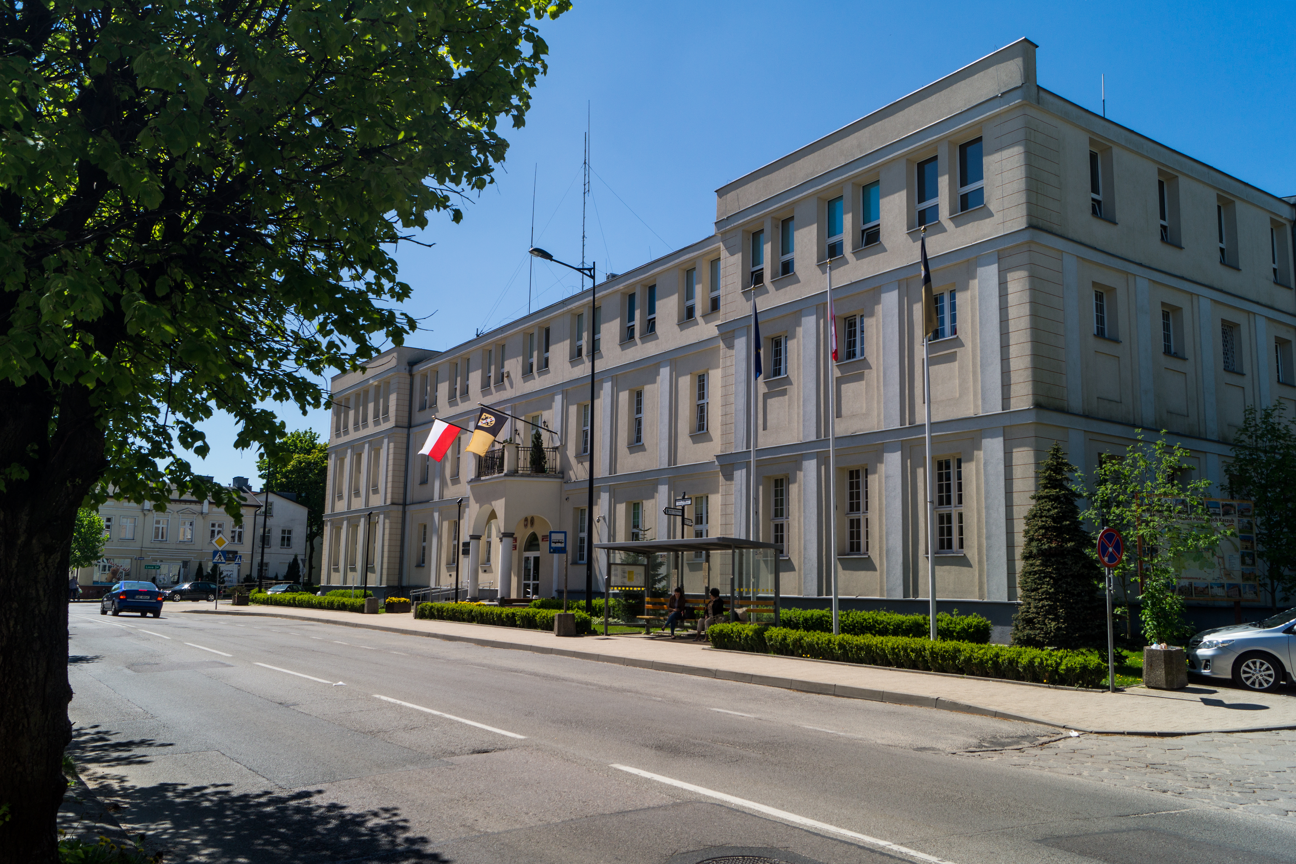 Budynek wejherowskiego starostwa powiatowego przy ulicy 3 maja.